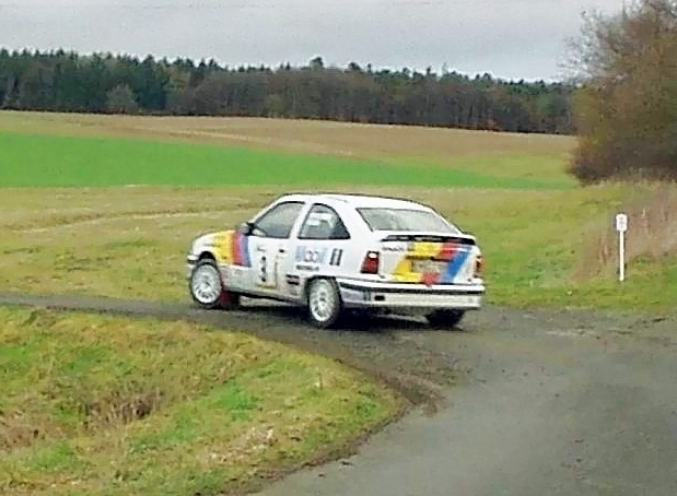 Rallye